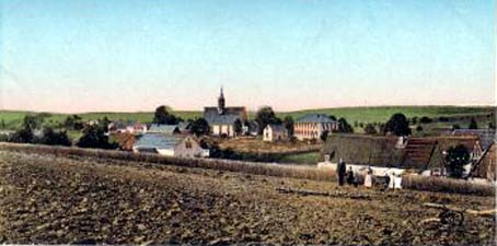 Liebenau (Sachsen/Geising) um 1910